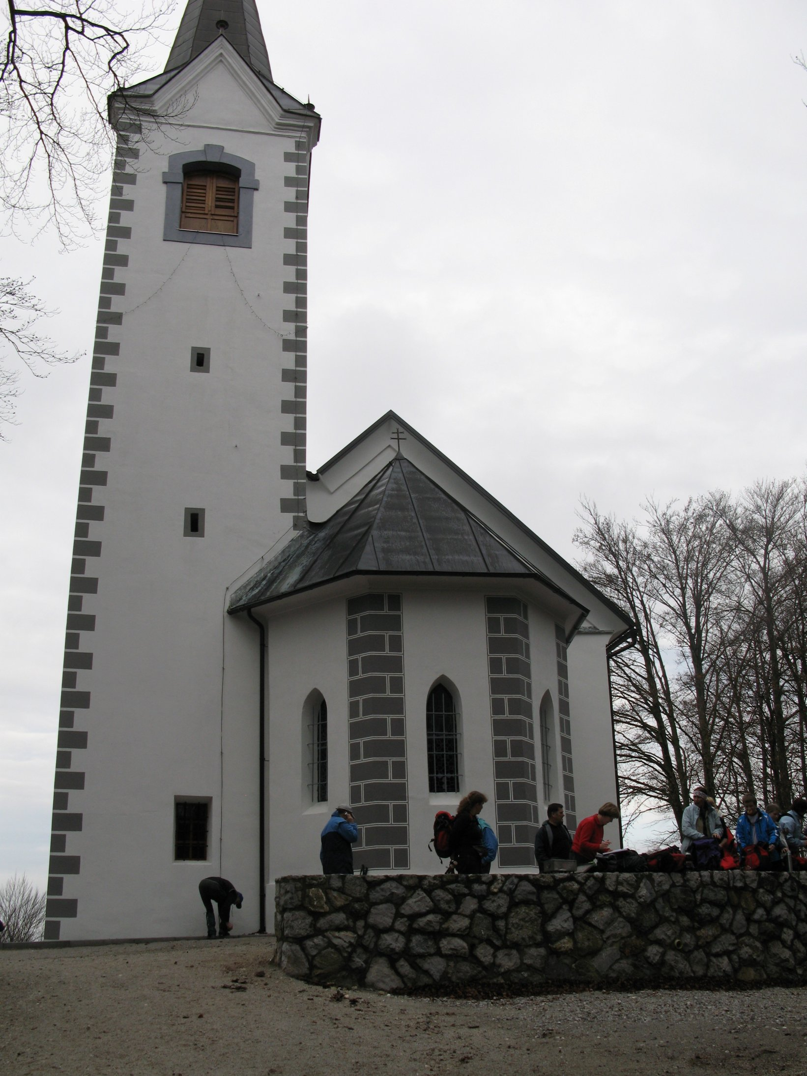 Magdalenska gora.